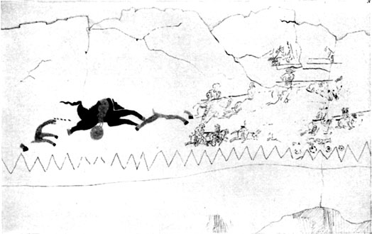 Desenho inacabado de influência sassânida encontrado em casa particular em Dura Europos